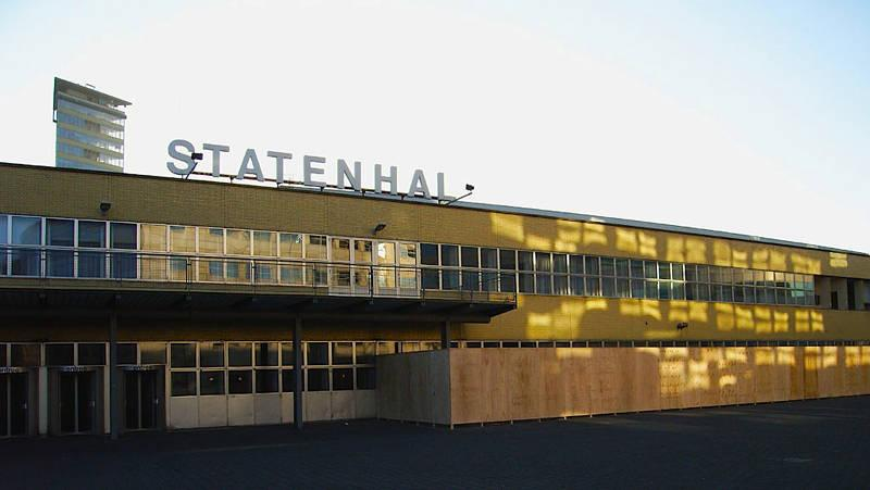 De Statenhal in Den Haag kort voordat deze gesloopt werd.